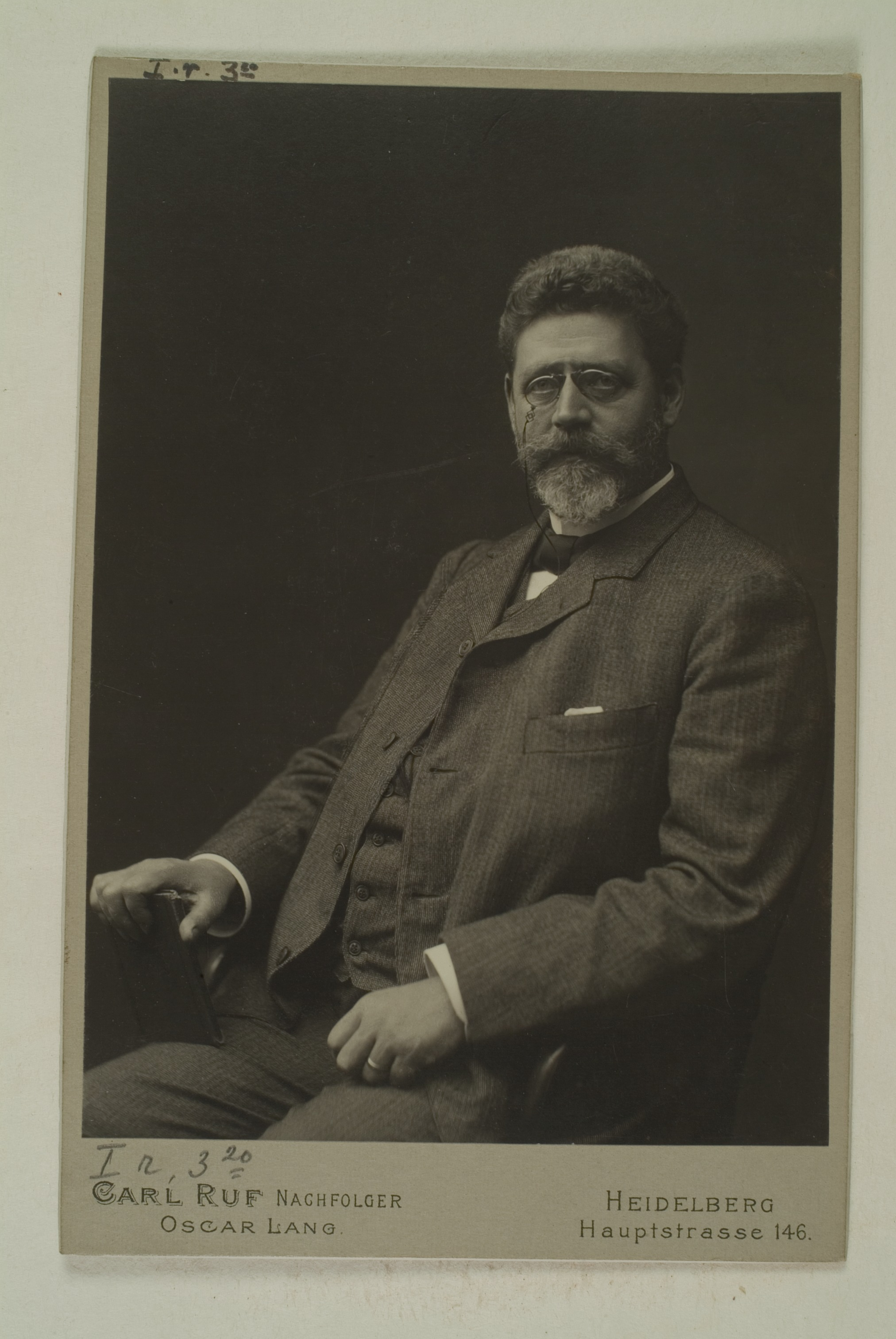 Karl Friedrich Theodor Rathgen, Nationalökonom, 1900–1907 Professor in Heidelberg